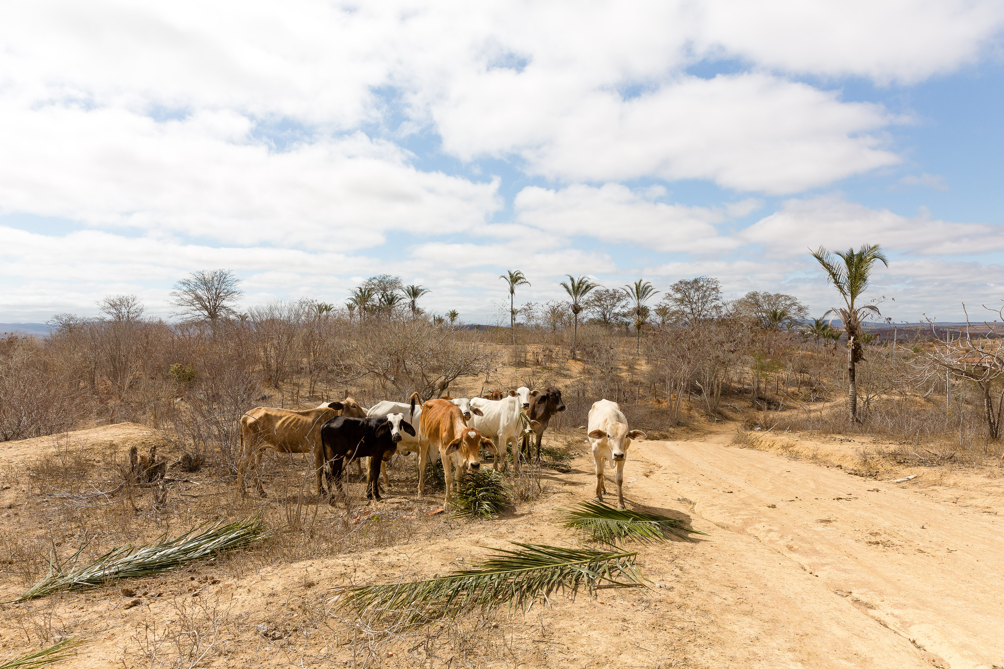 Semiárido baiano, Planalto - BA - Brasil.